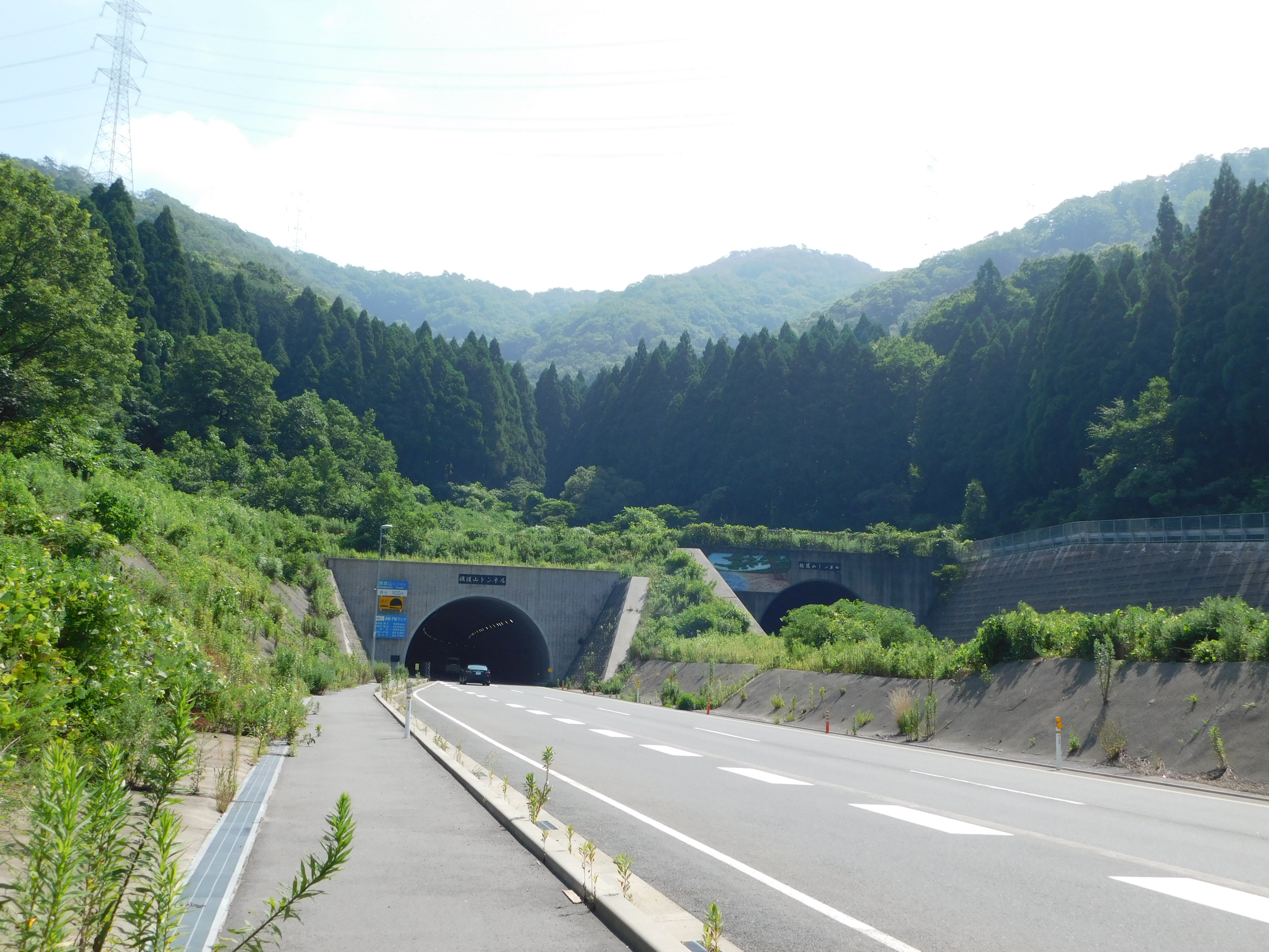 福井県の旗護山トンネルの美浜町側。